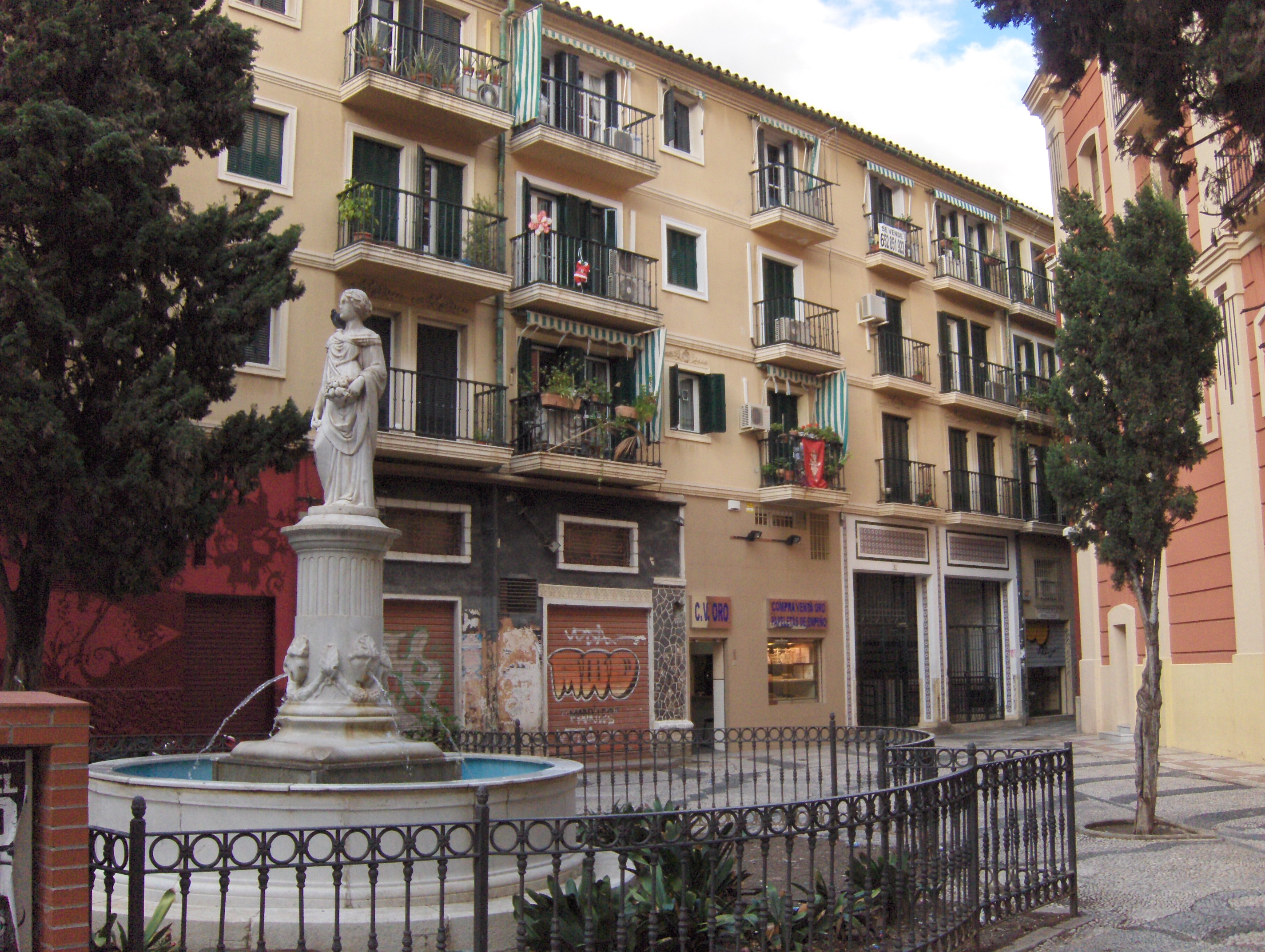 Plaza de San Francisco, Málaga, España.